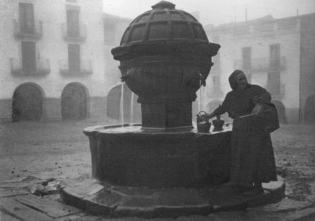 Dona agafant aigua de la font de la plaça de Prades. Marcel·lí Gausachs i Gausachs (Entre 1909 i 1927)